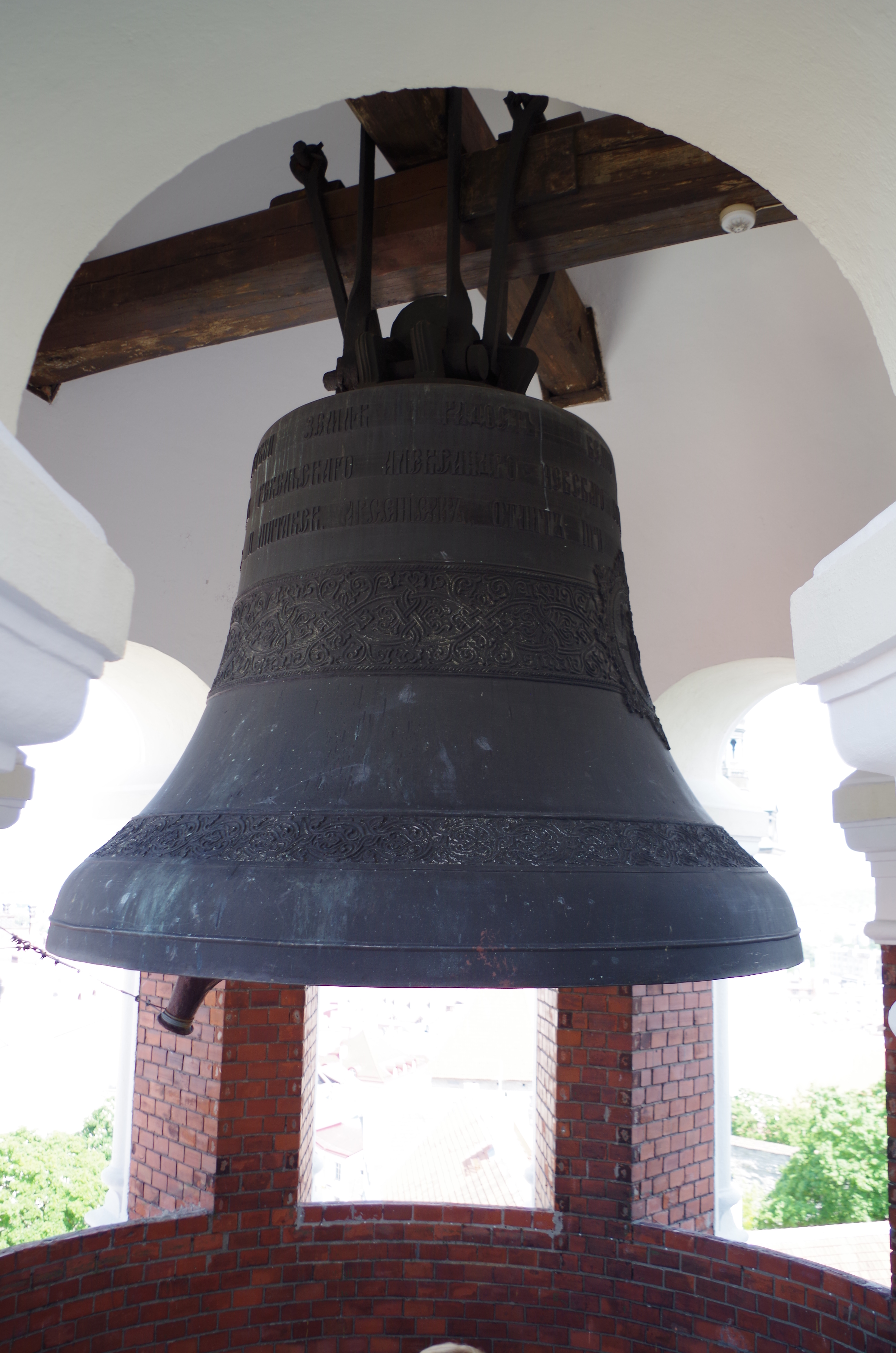 Nevski katedraal